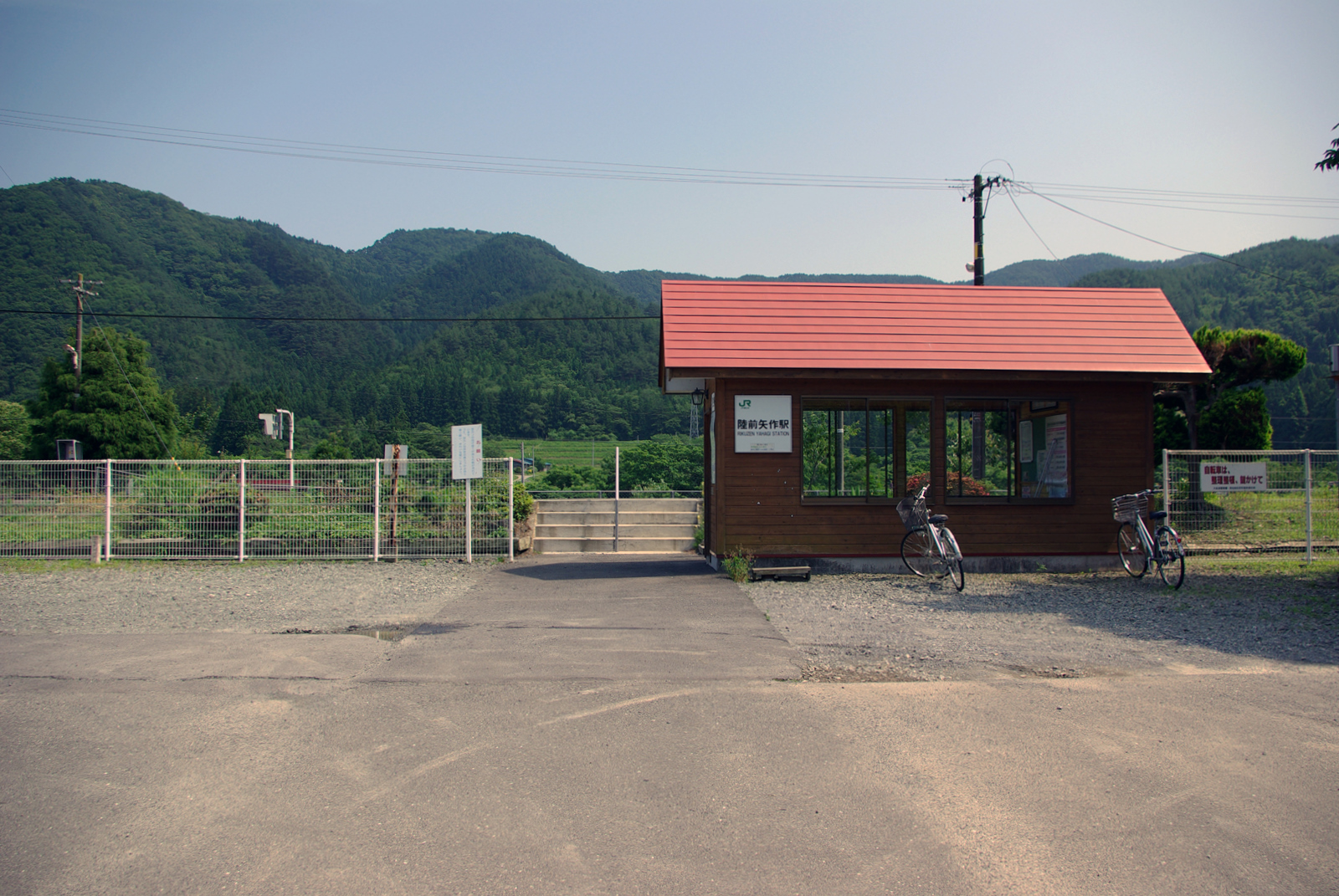 JR大船渡線陸前矢作駅